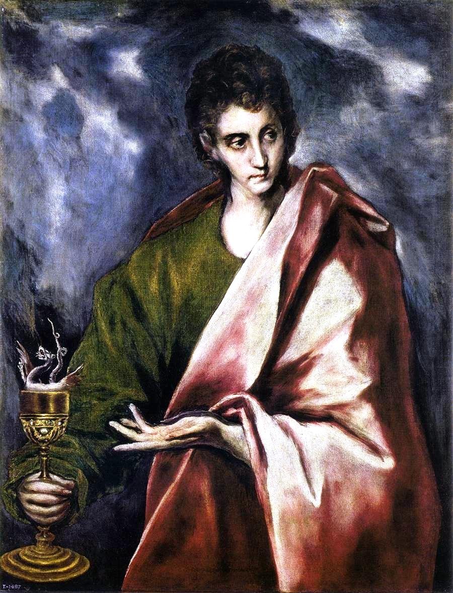 La obra representa a San Juan Evangelista.